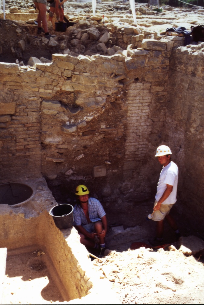 Römische Villa Milreu, Estoi, Ansicht der Ölmühle während der Ausgrabung.